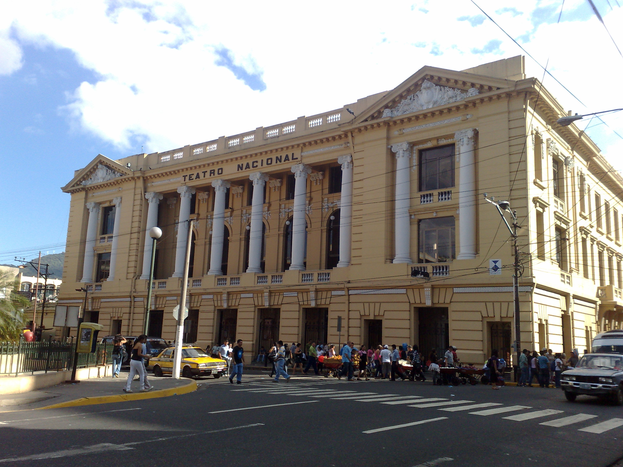 El primer teatro nacional fue consumido por un incendio en el año 1910, el actual, se comenzó a construir en el año 1911 y fue re-modelado en 1978.